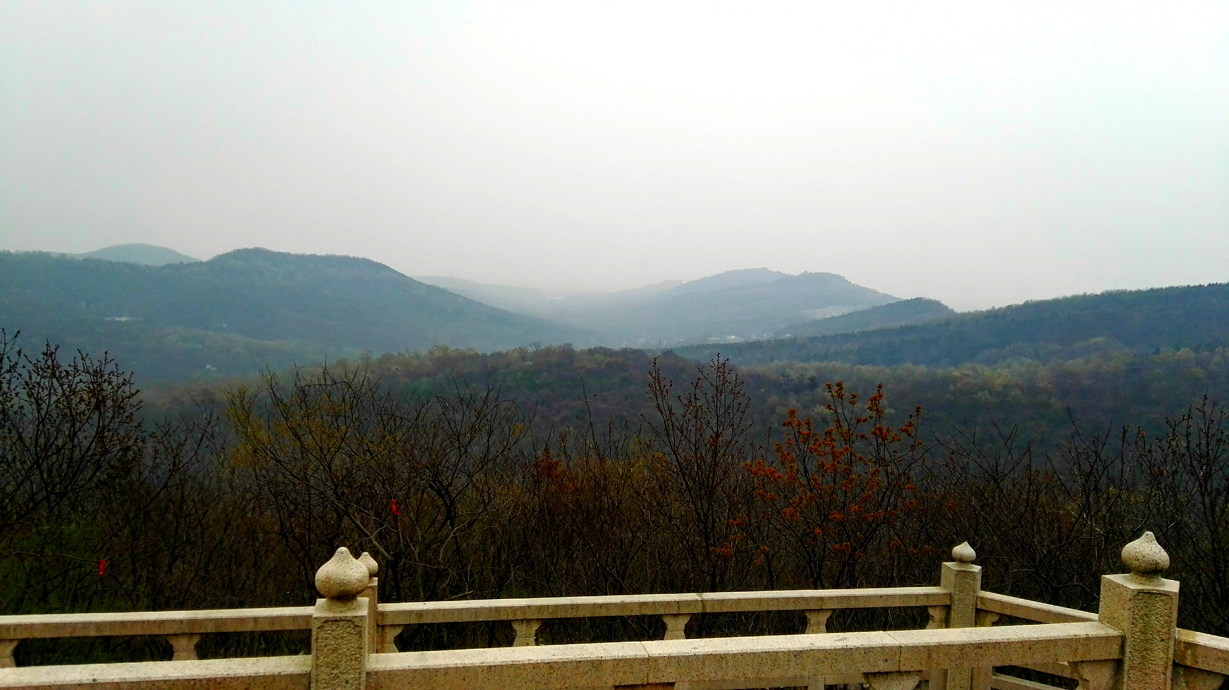 中文（中国大陆）: 淮南市八公山